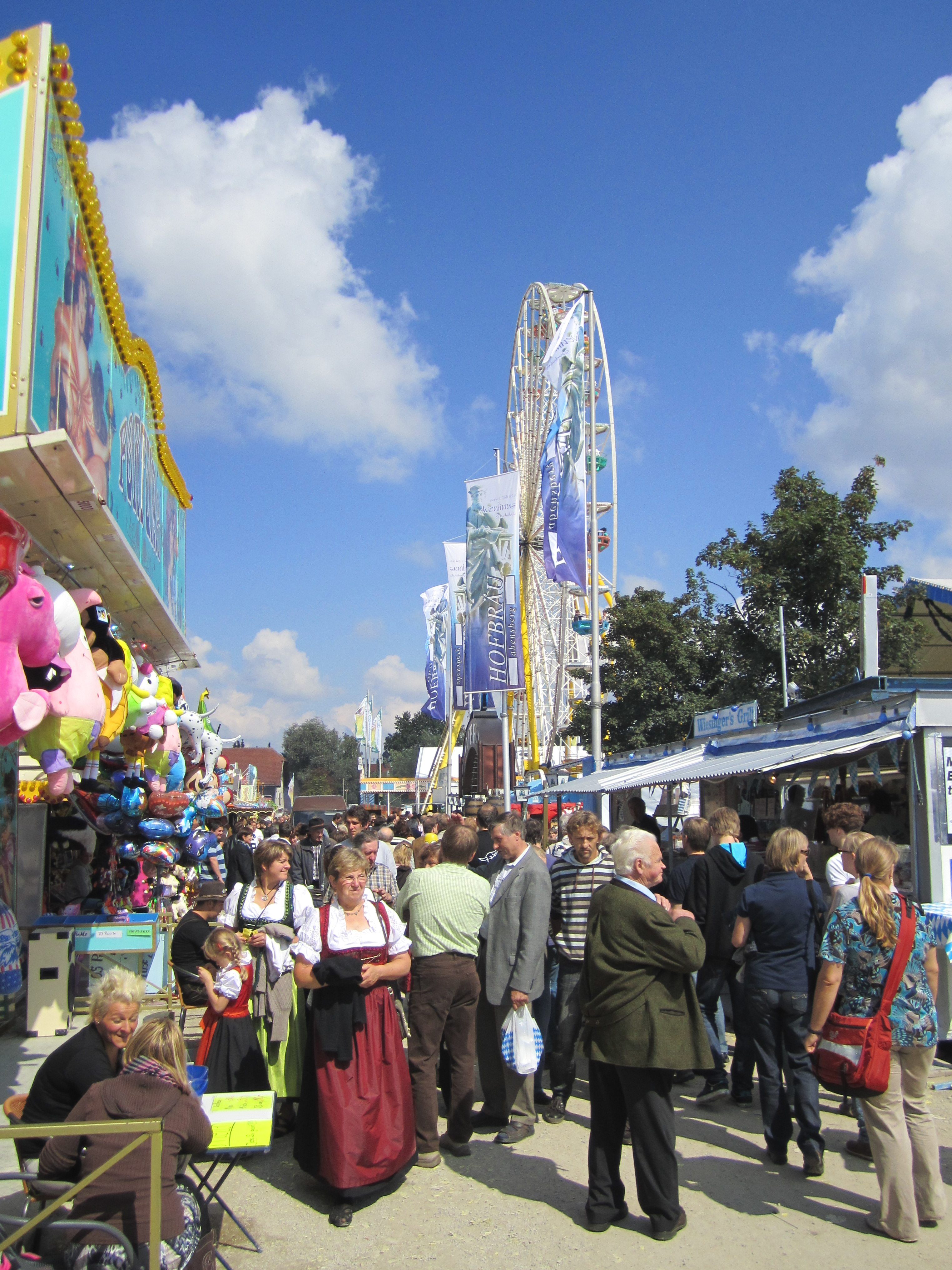 Abensberg, Landkreis Kelheim, Niederbayern: Das Volksfest "Der Gillamoos", das Fest der Hallertau, ist einer der ältesten Jahrmärkte in Bayern.